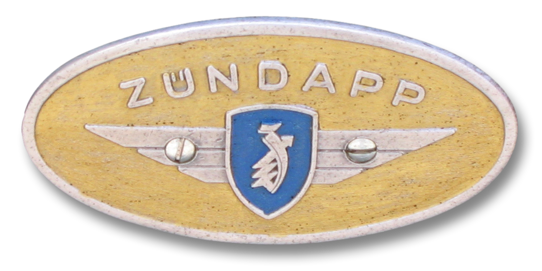 Логотип компании Zundapp. Обработанный файл. Автор фотографии - User:Flominator.